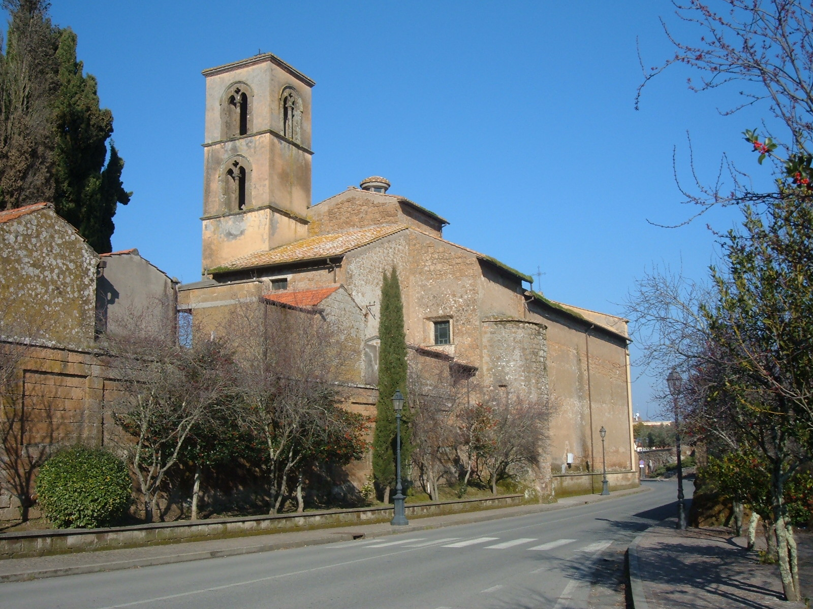 Chiesa di Santa Maria del Piano (Barbarano Romano)